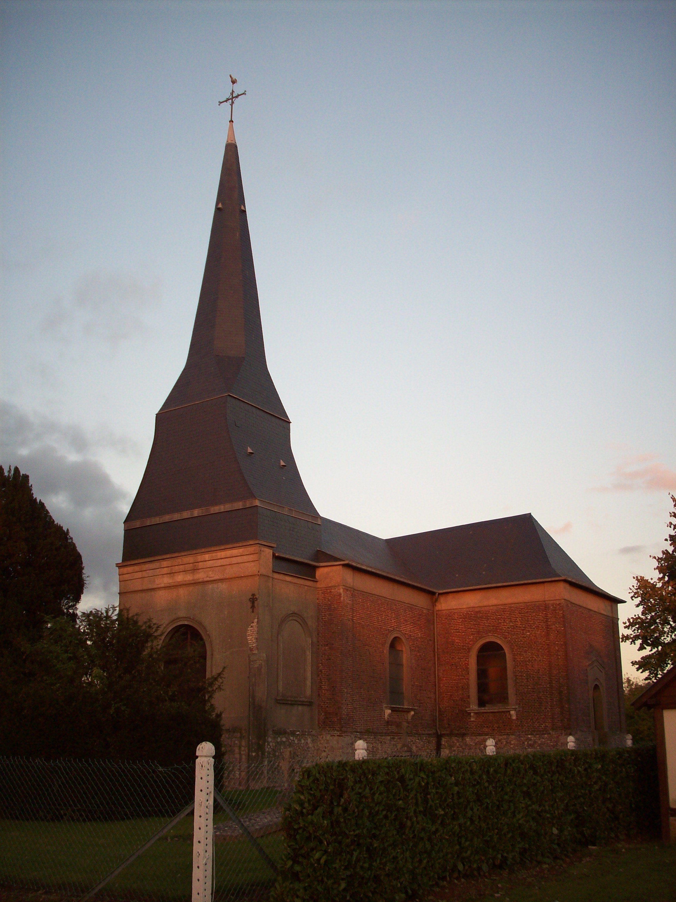 Eglise de La Haye.